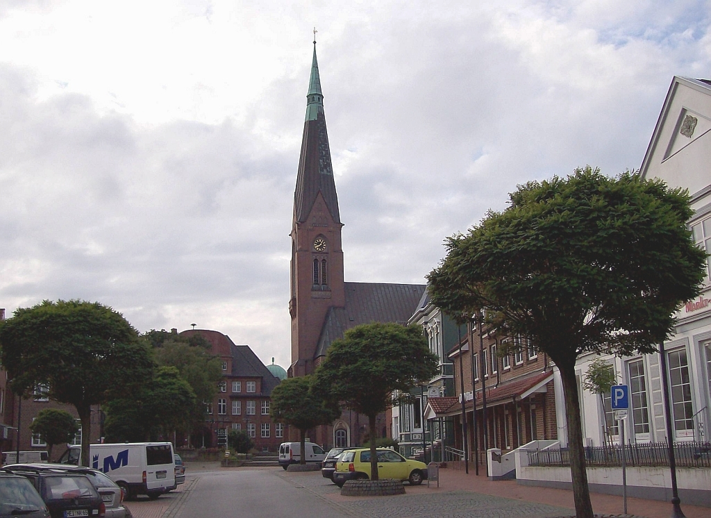 Marne (Germany) Kirche